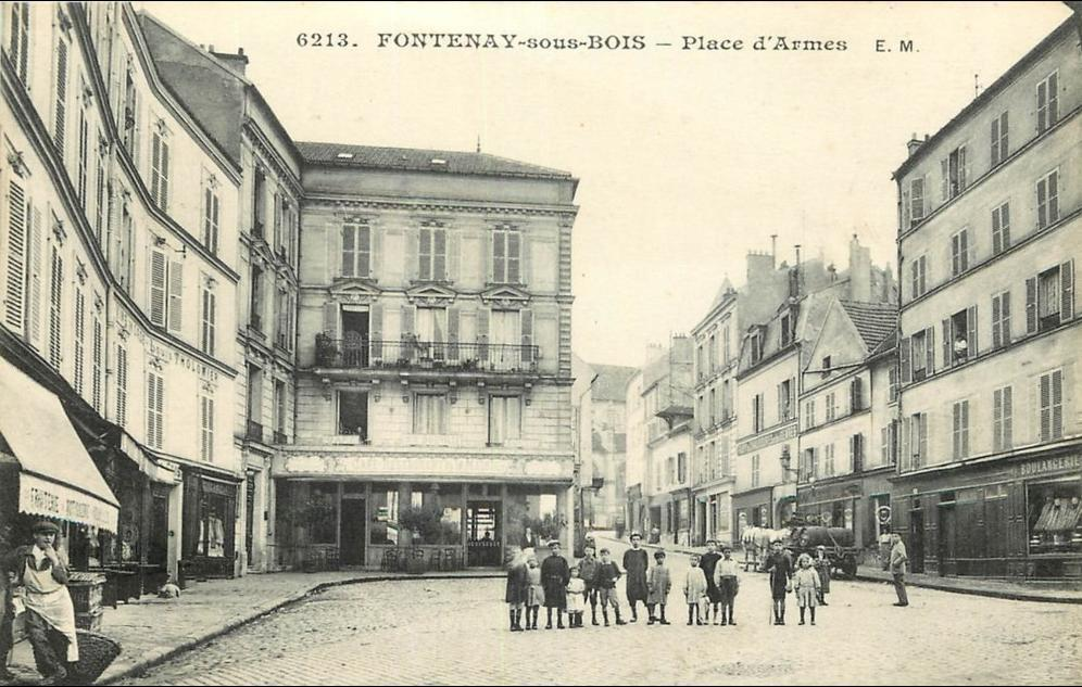 Fontenay-sous-Bois.Place d'Armes